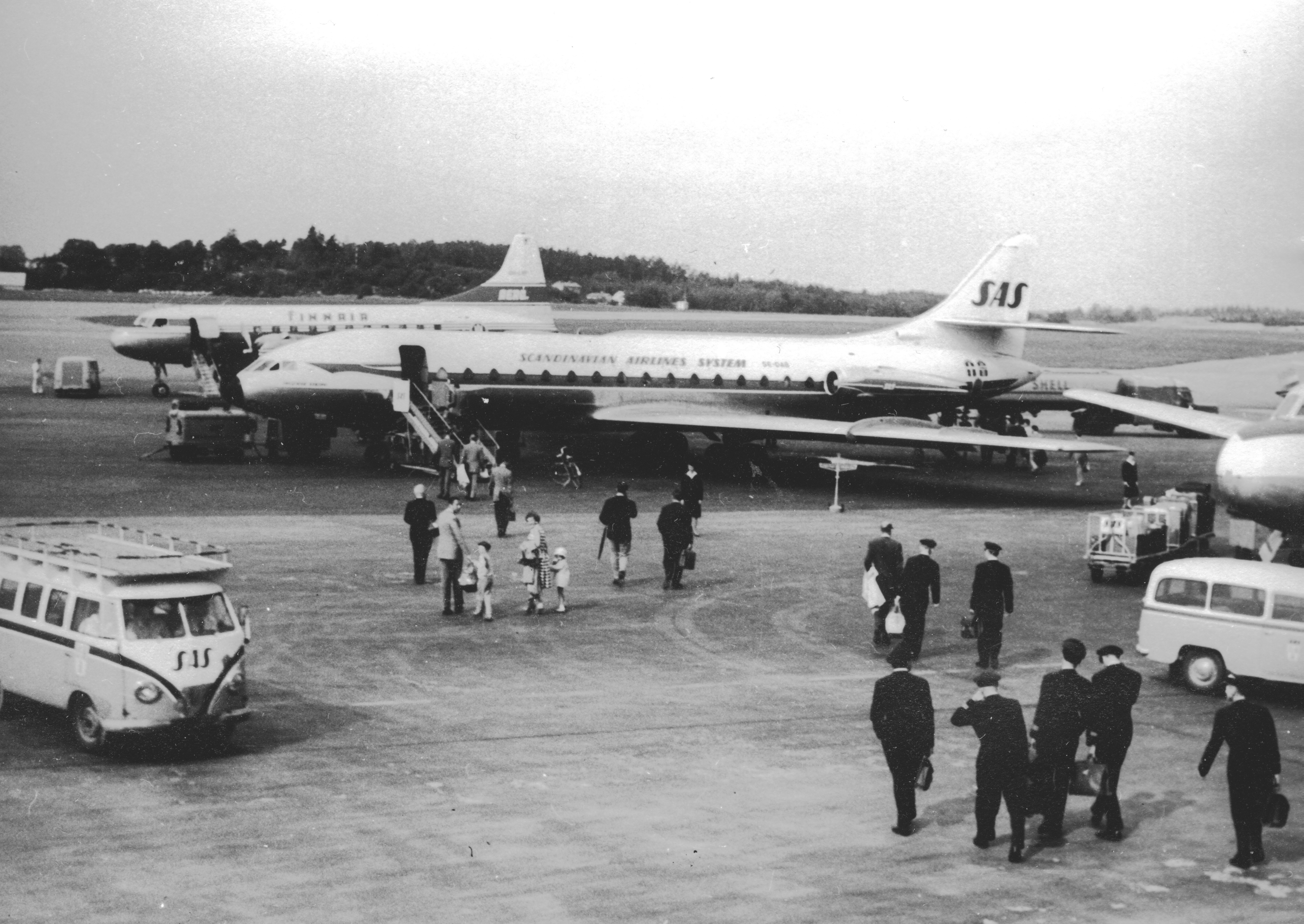 Caravelle på Bromma